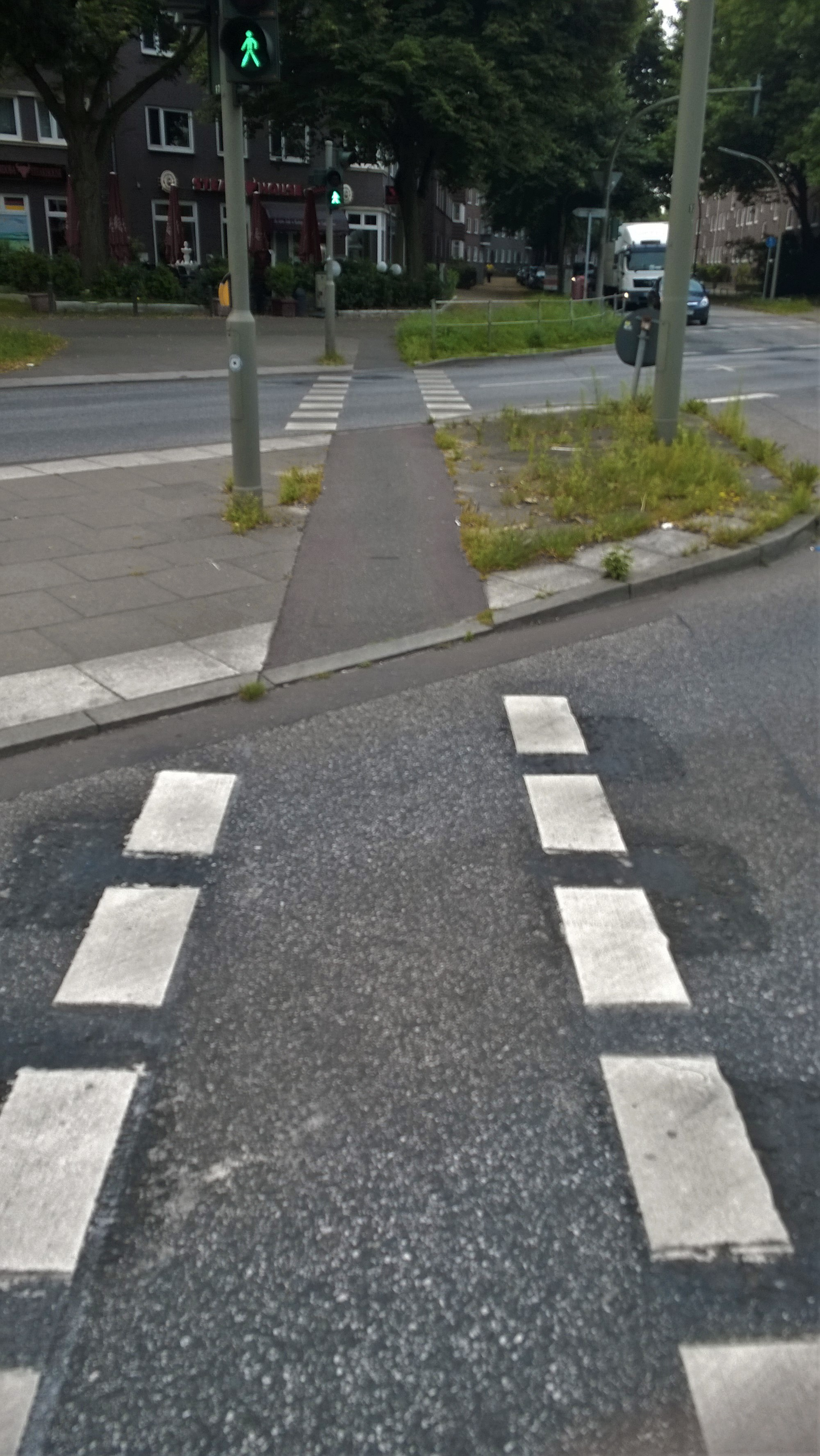 Im Vordergrund befindet sich eine Radwegefurt mit neuer Markierungsart (mitteldicke Linien) wobei die alten Quardrate noch zu erkennen sind. Im Hintergrund befindet sich eine Radwegefurt mit alter Markierungsart. Bei dieser sind Quadrate auf die Straße aufgebraucht.